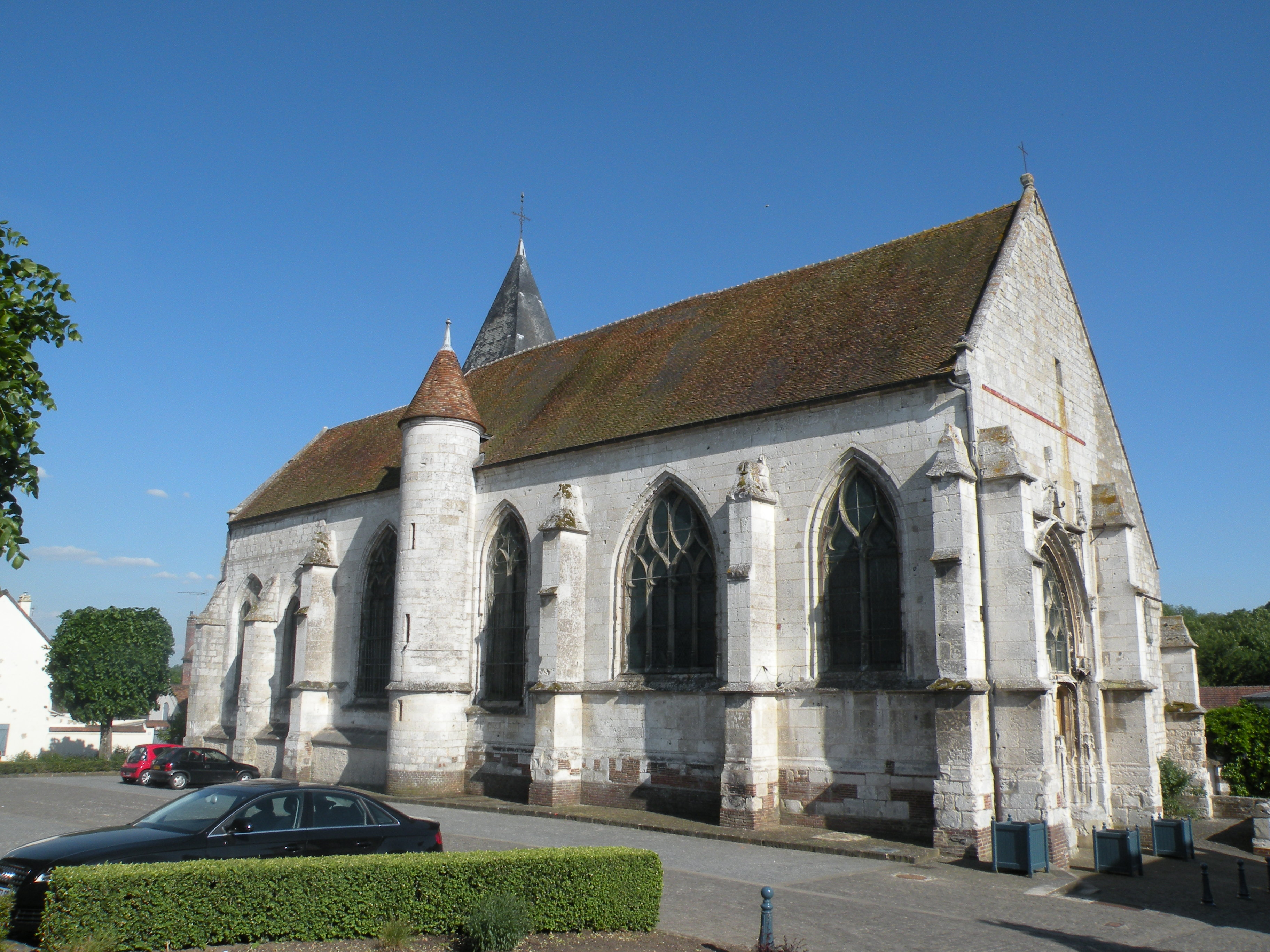 église d'Allonne, Oise, France